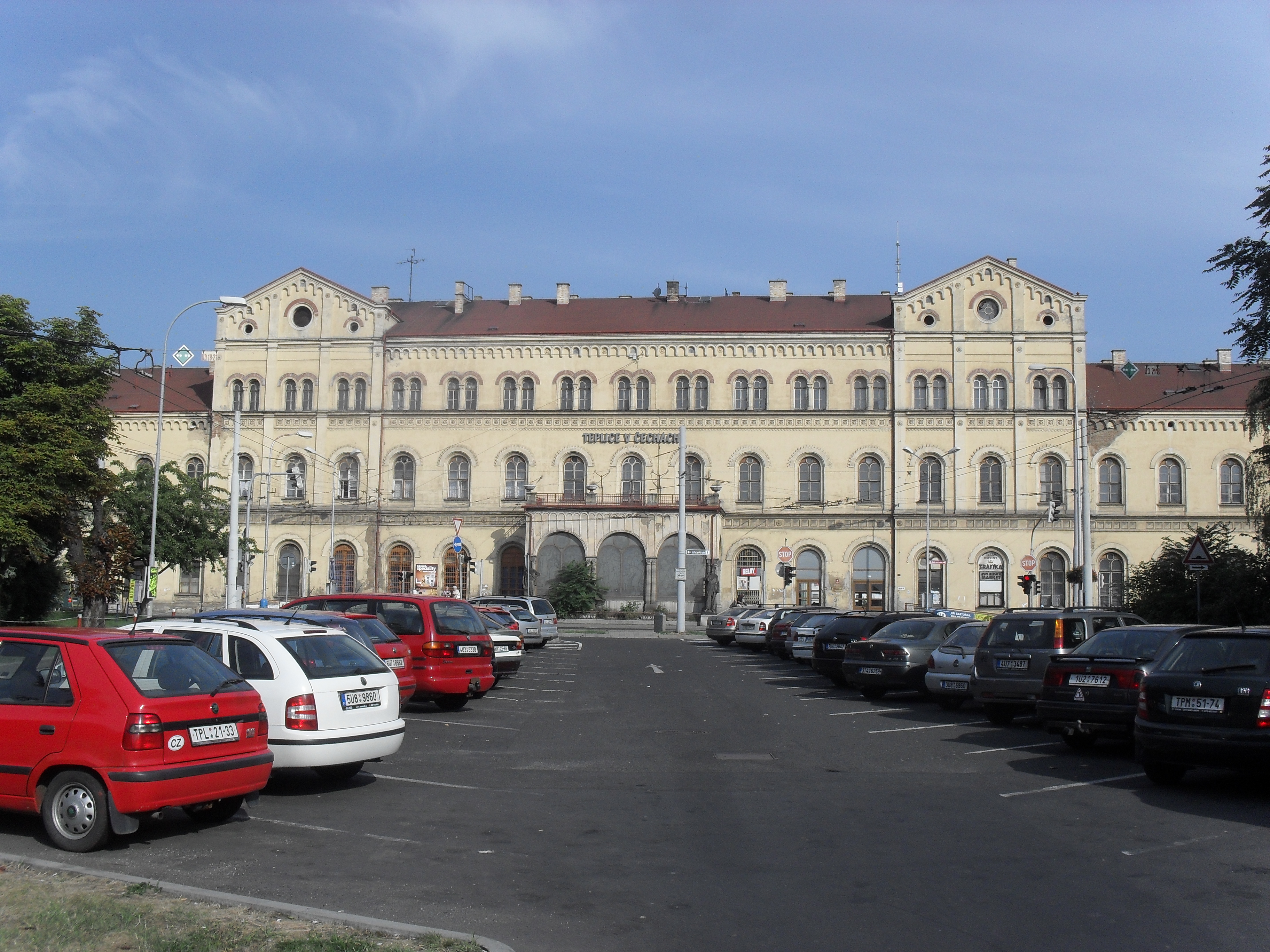 (TTO) Železniční stanice (Teplice) - Nádražní náměstí 599, Teplice